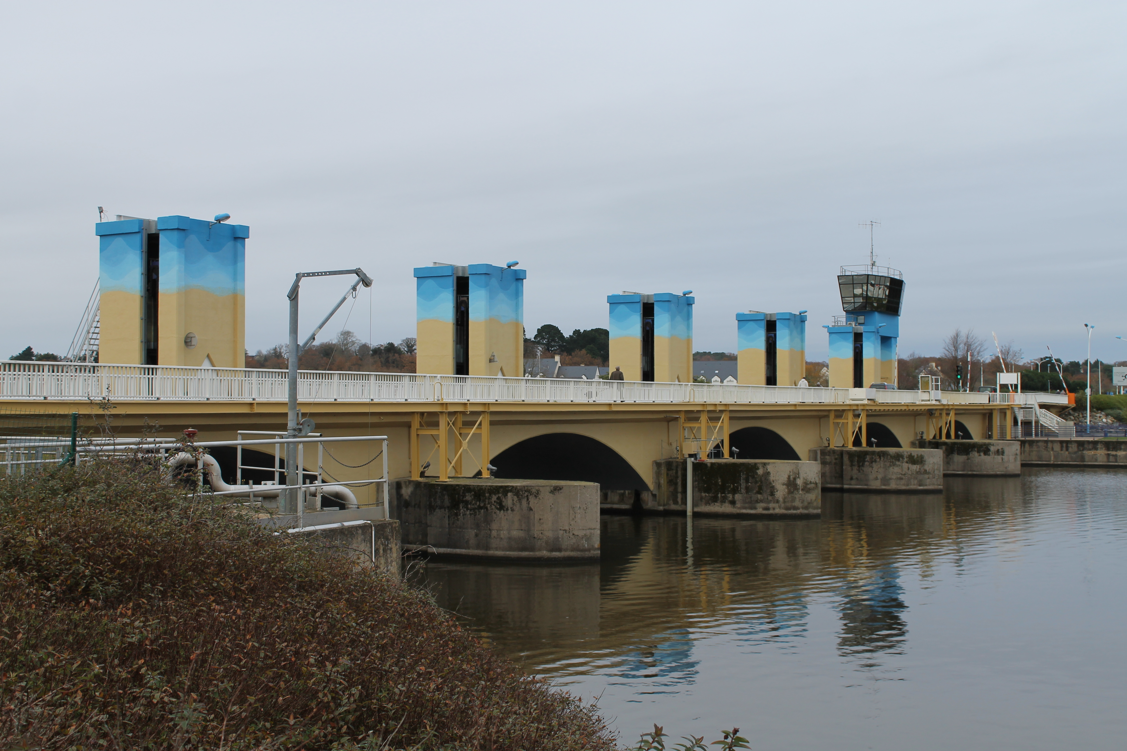 Barrage d'Arzal, sur l'estuaire de la Vilaine.